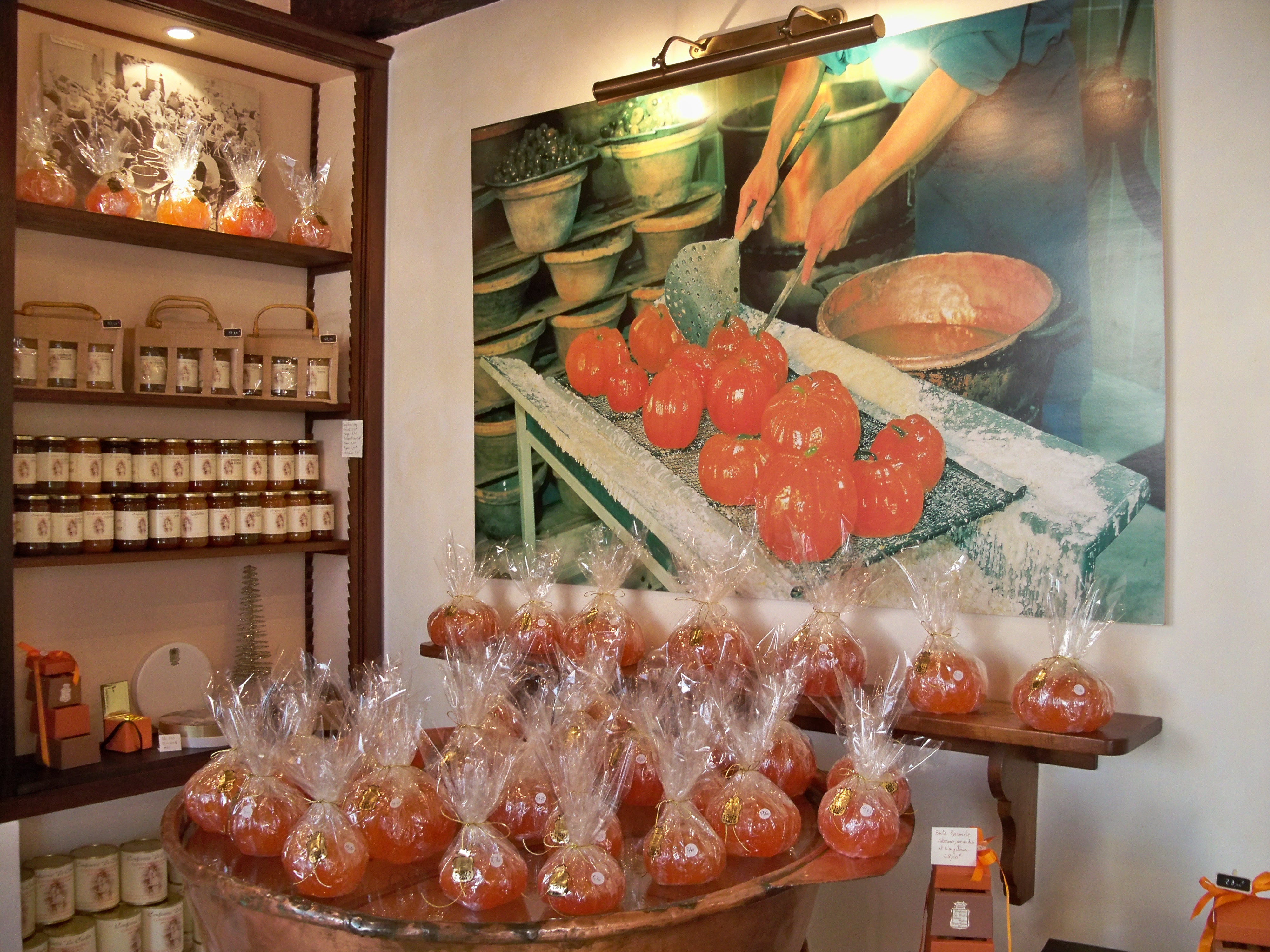 Fuits confits d'Apt et leur fabrication